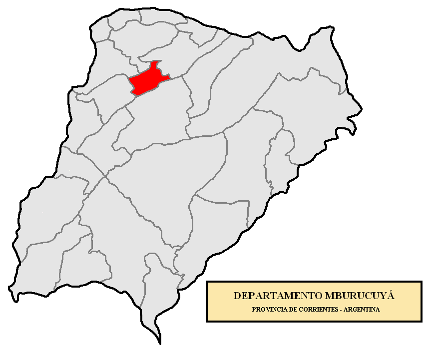 Localización del Departamento Mburucuyá en la provincia de Corrientes, Argentina Localización del Departamento Mburucuyá, en la provincia de Corrientes, Argentina.